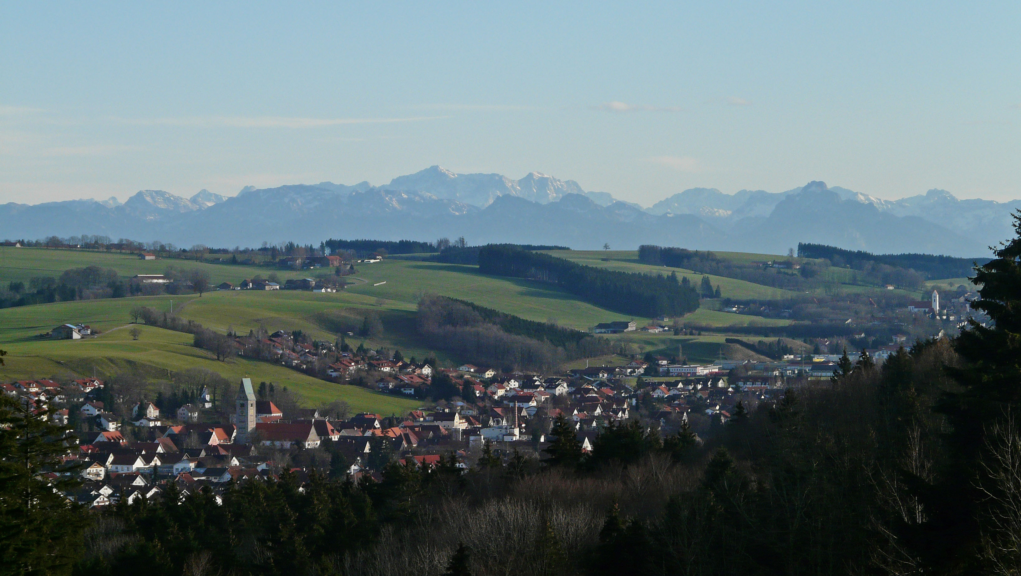 Obergünzburg von Nordwesten